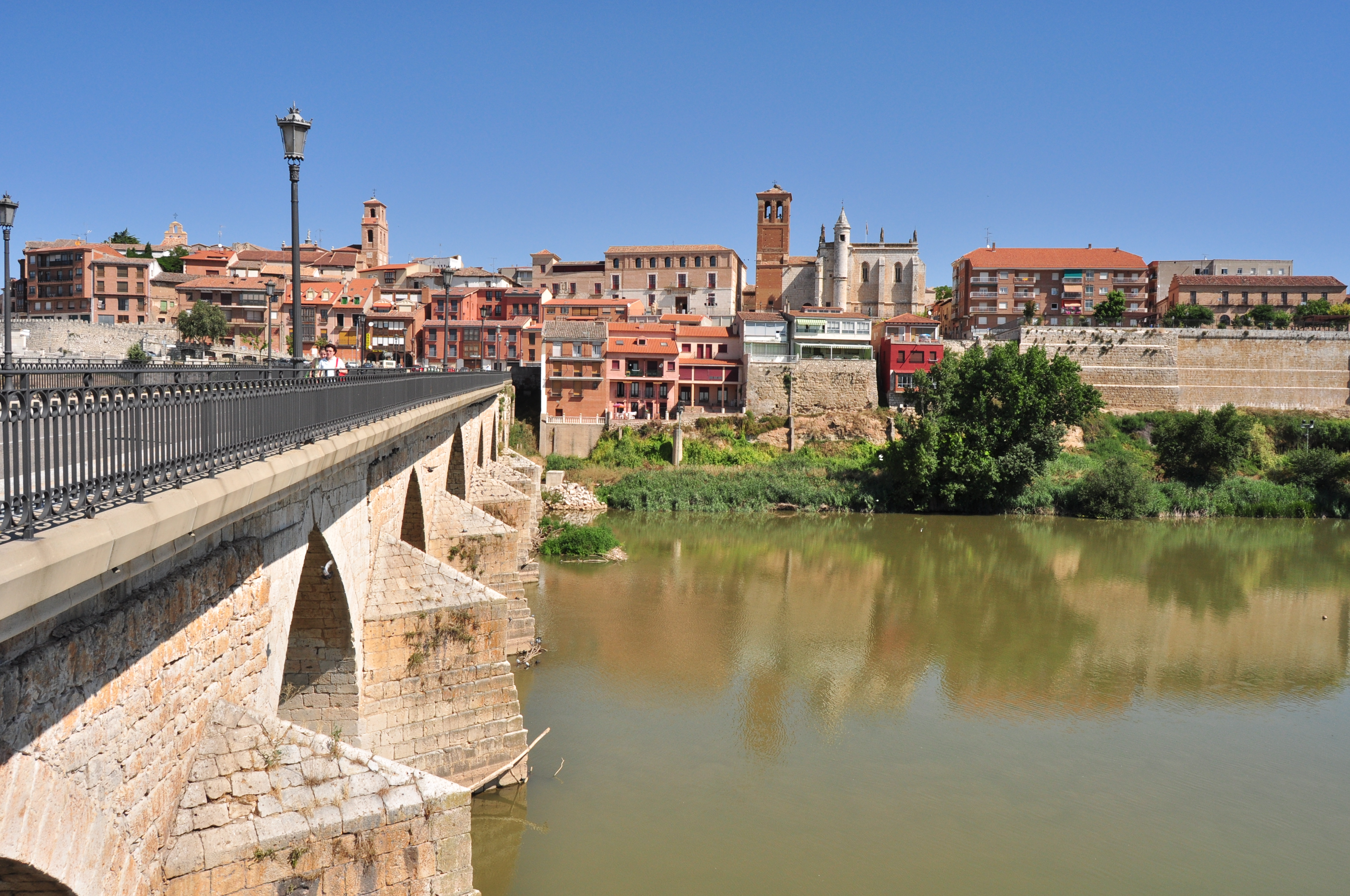 Tordesillas - 001